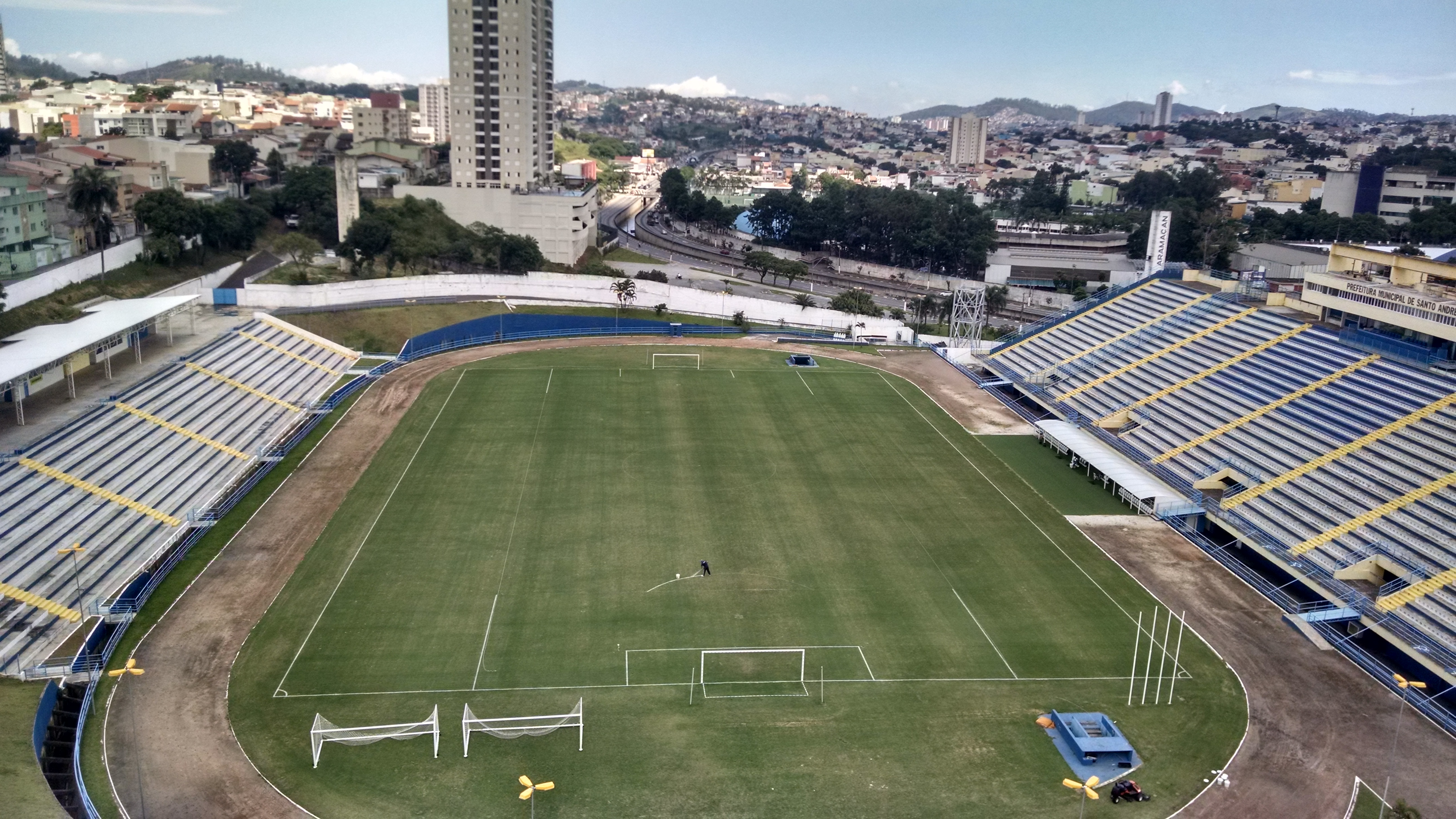 Estádio Municipal Bruno José Daniel e Redores